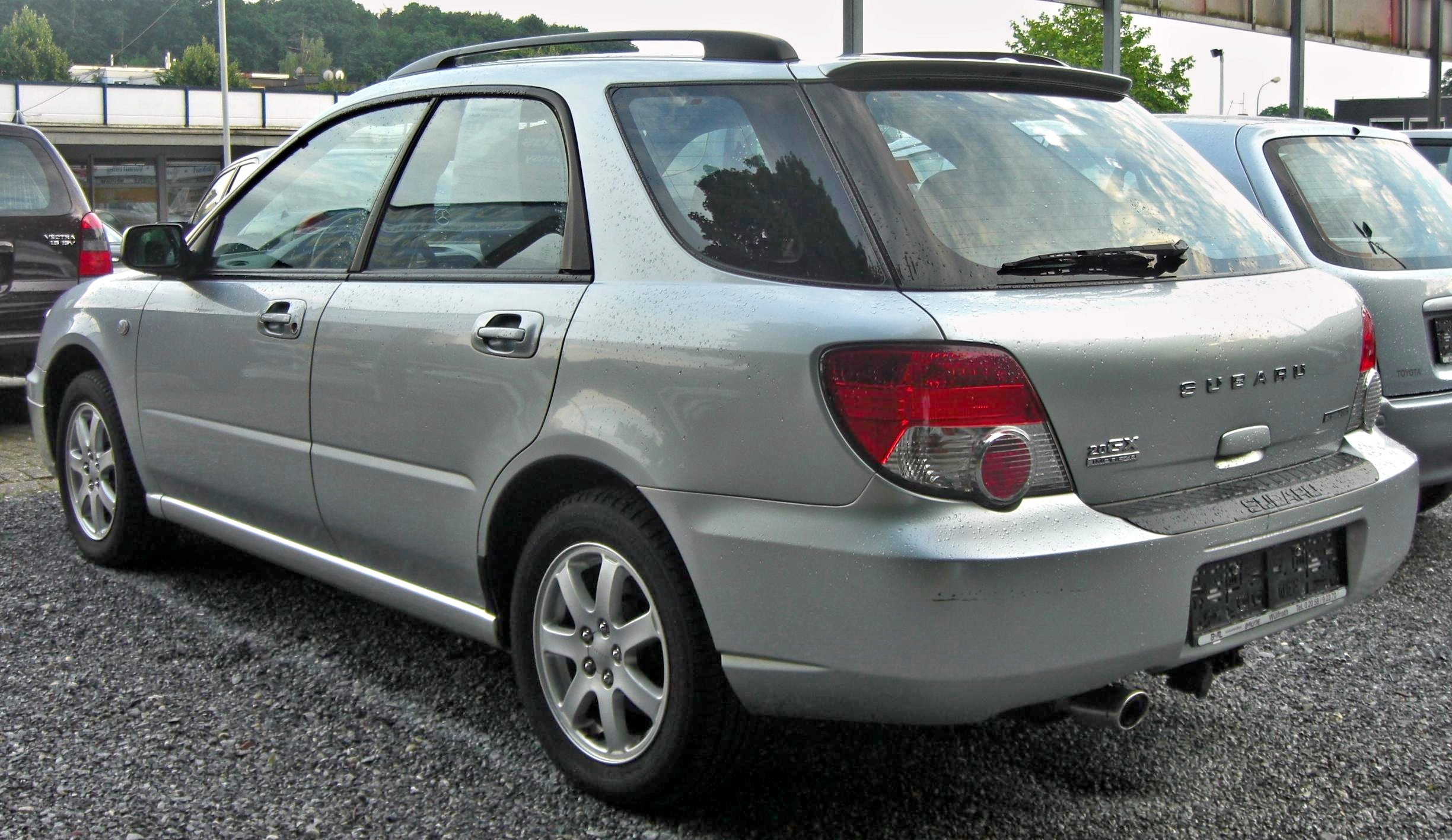 Subaru Impreza Sportkombi